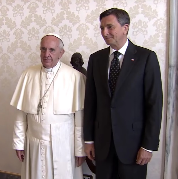 Visite du président slovène Borut Pahor au Pape François.